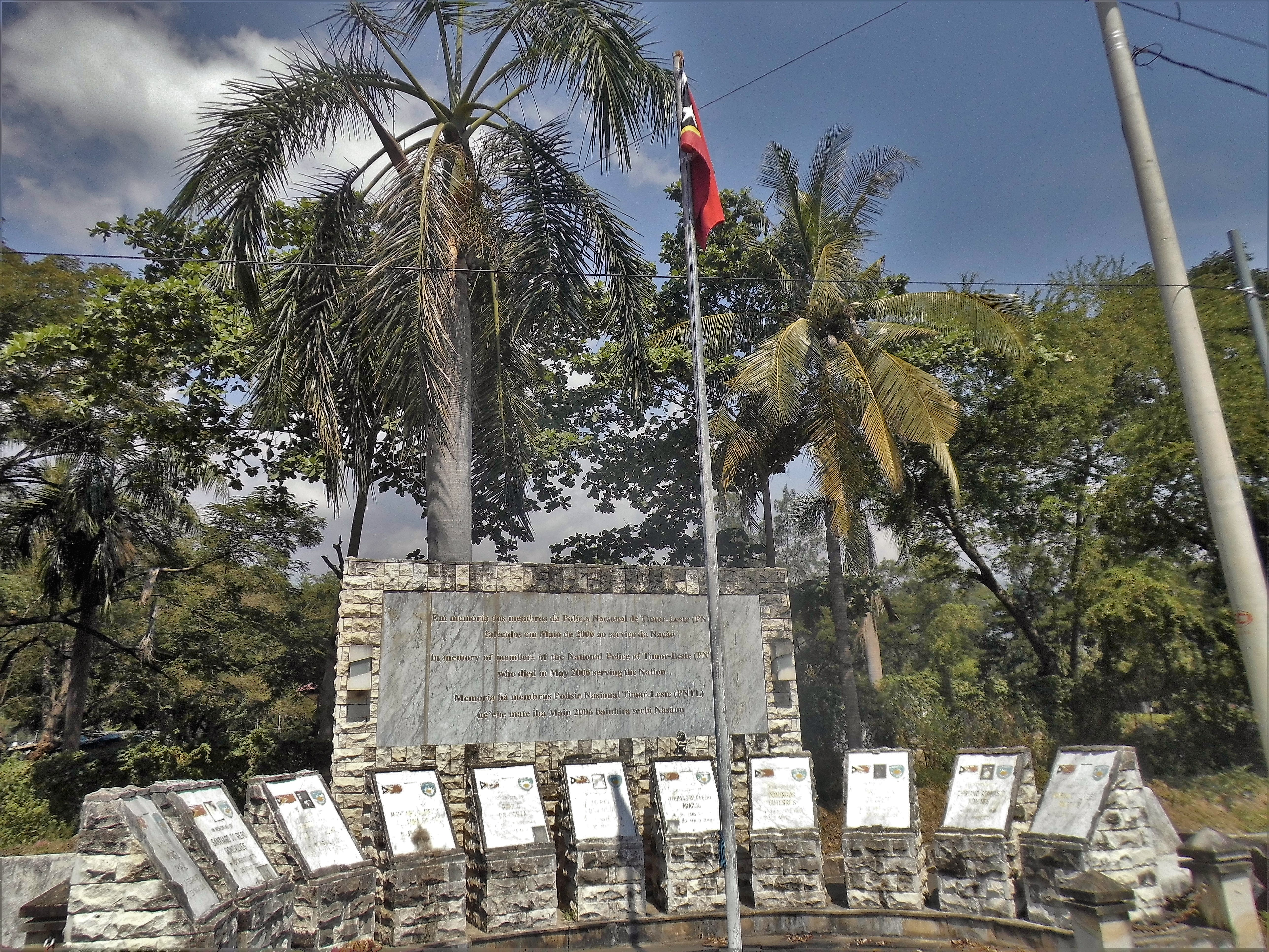 Polizeidenkmal